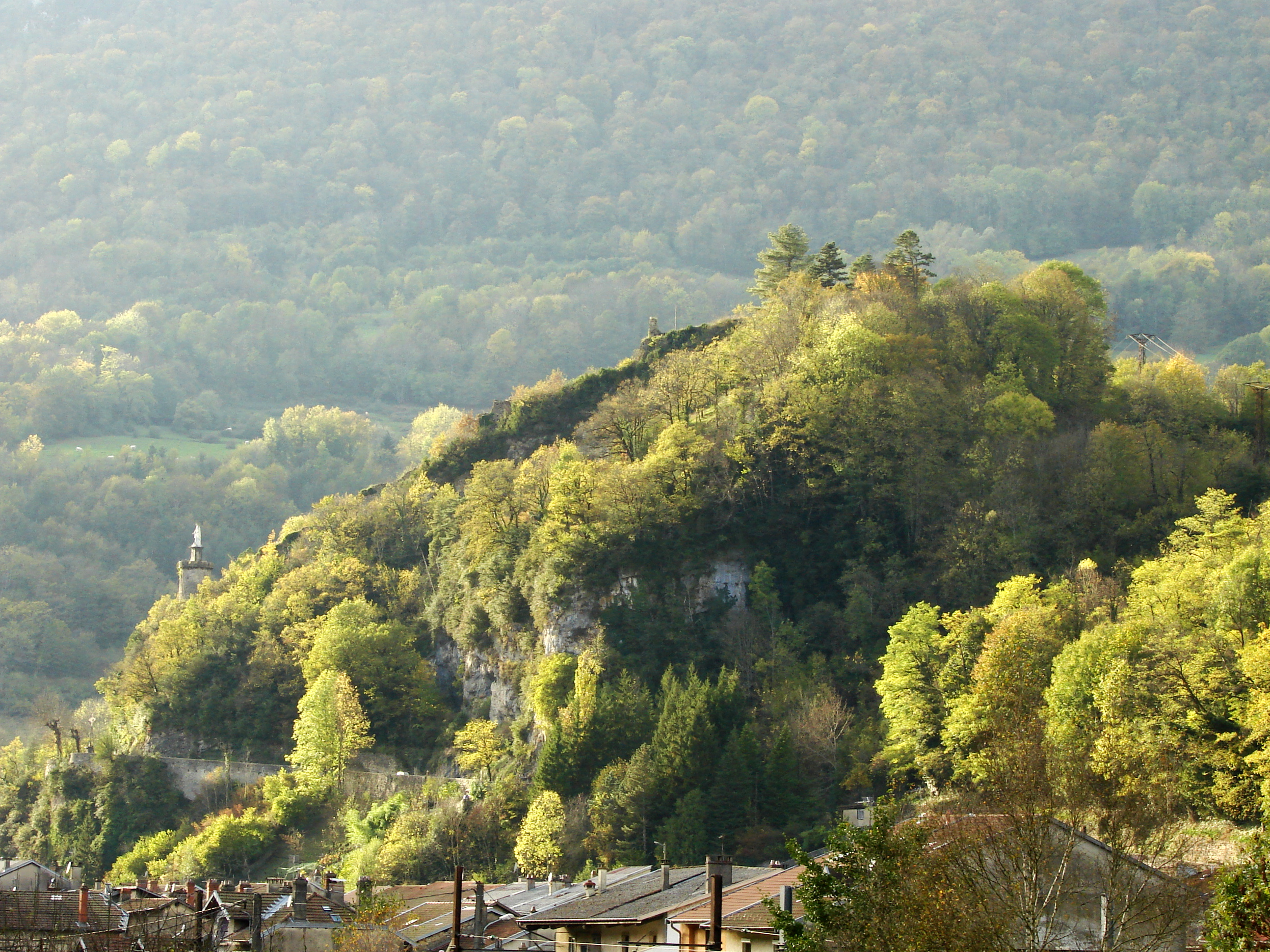 Ruine du Château de Cornillon de Saint-Rambert-en-Bugey